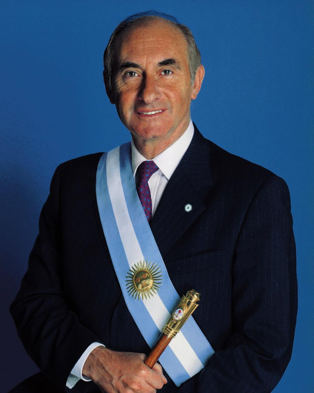 presidente Fernando de la Rúa. Con banda y bastón presidencial. Argentina